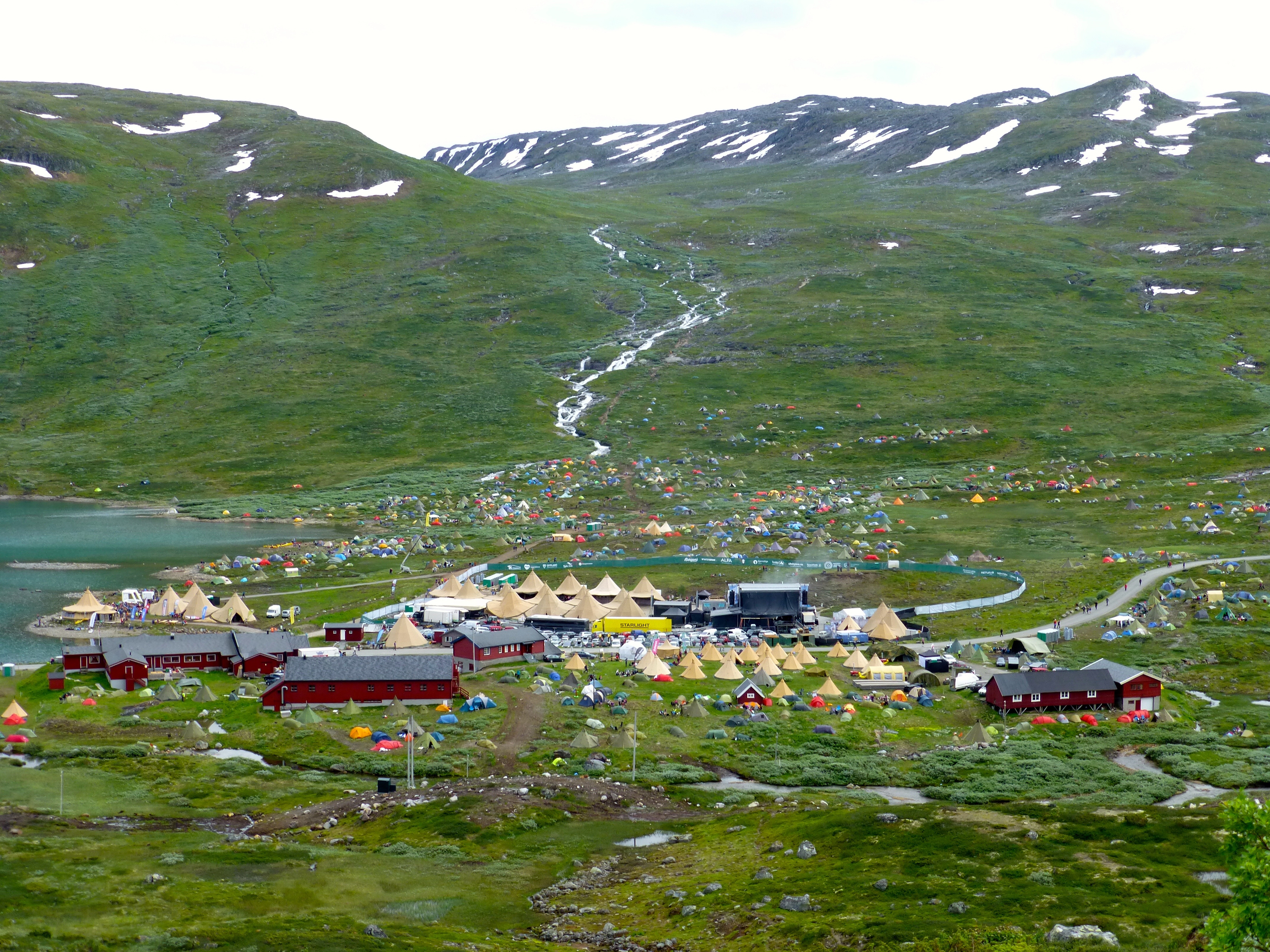 Vinjerock